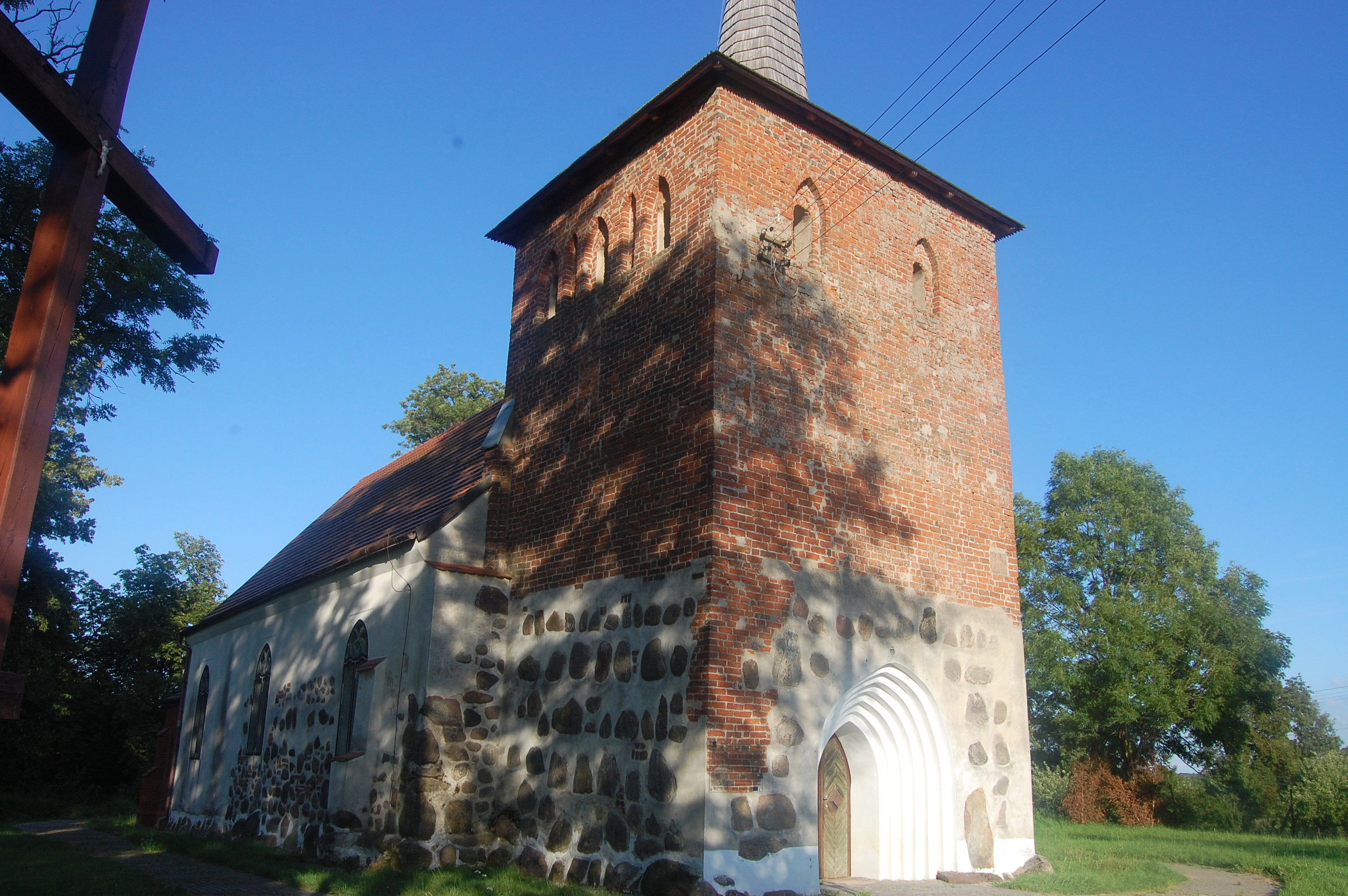 Kościół w Rusowie - widok ogólny